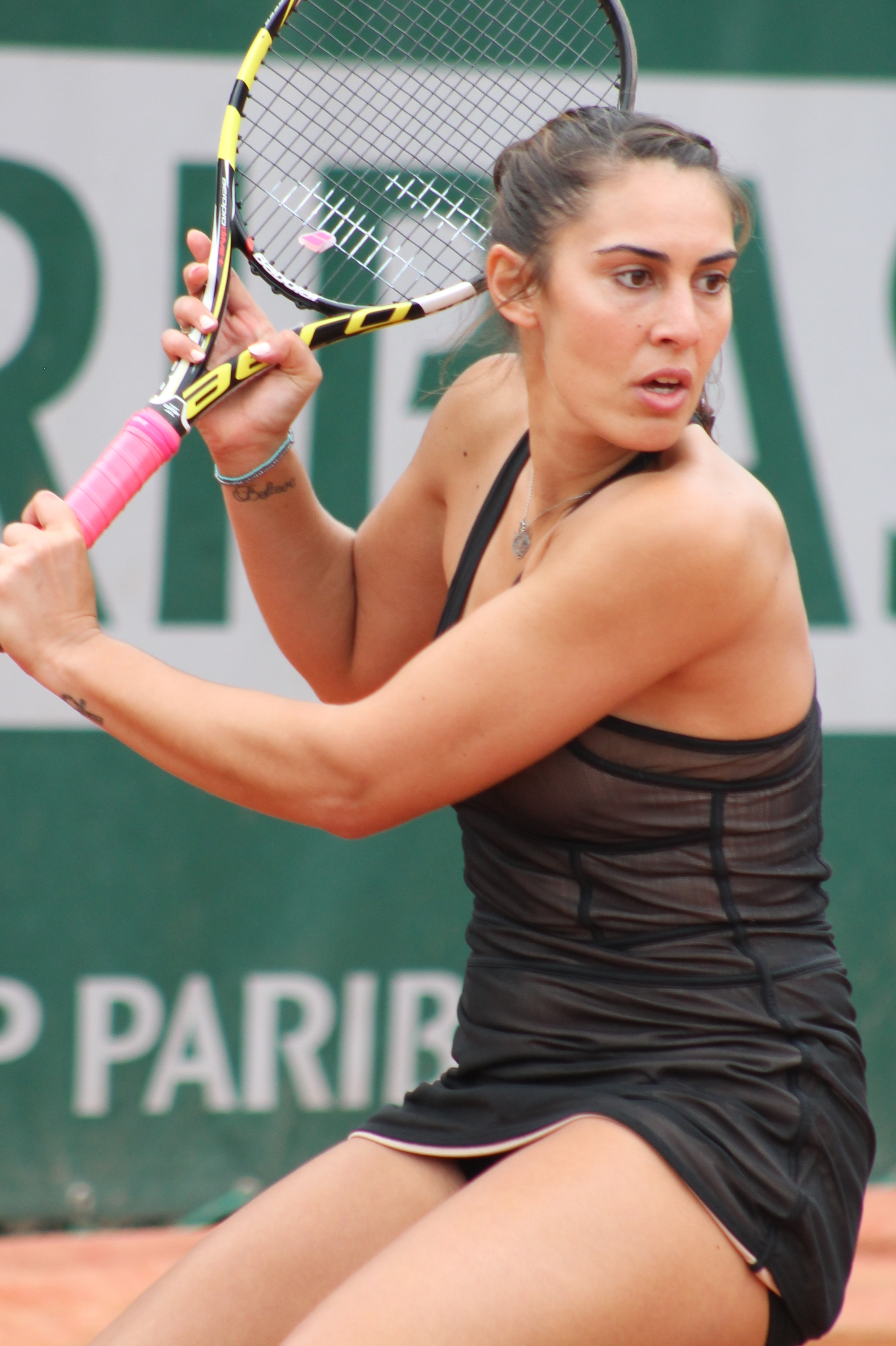 Reix RG15 (4)